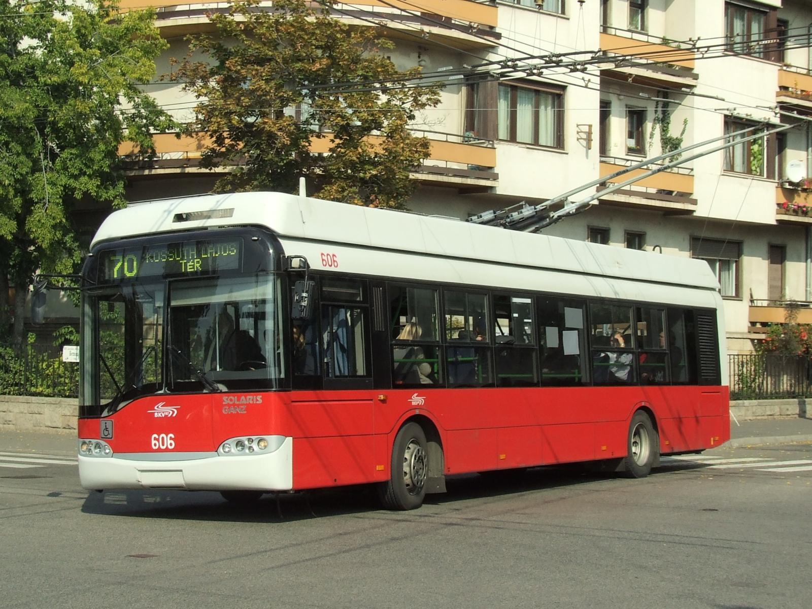 Solaris-Ganz Trollino 12 a Hermina út sarkán (Budapest, XIV. kerület)